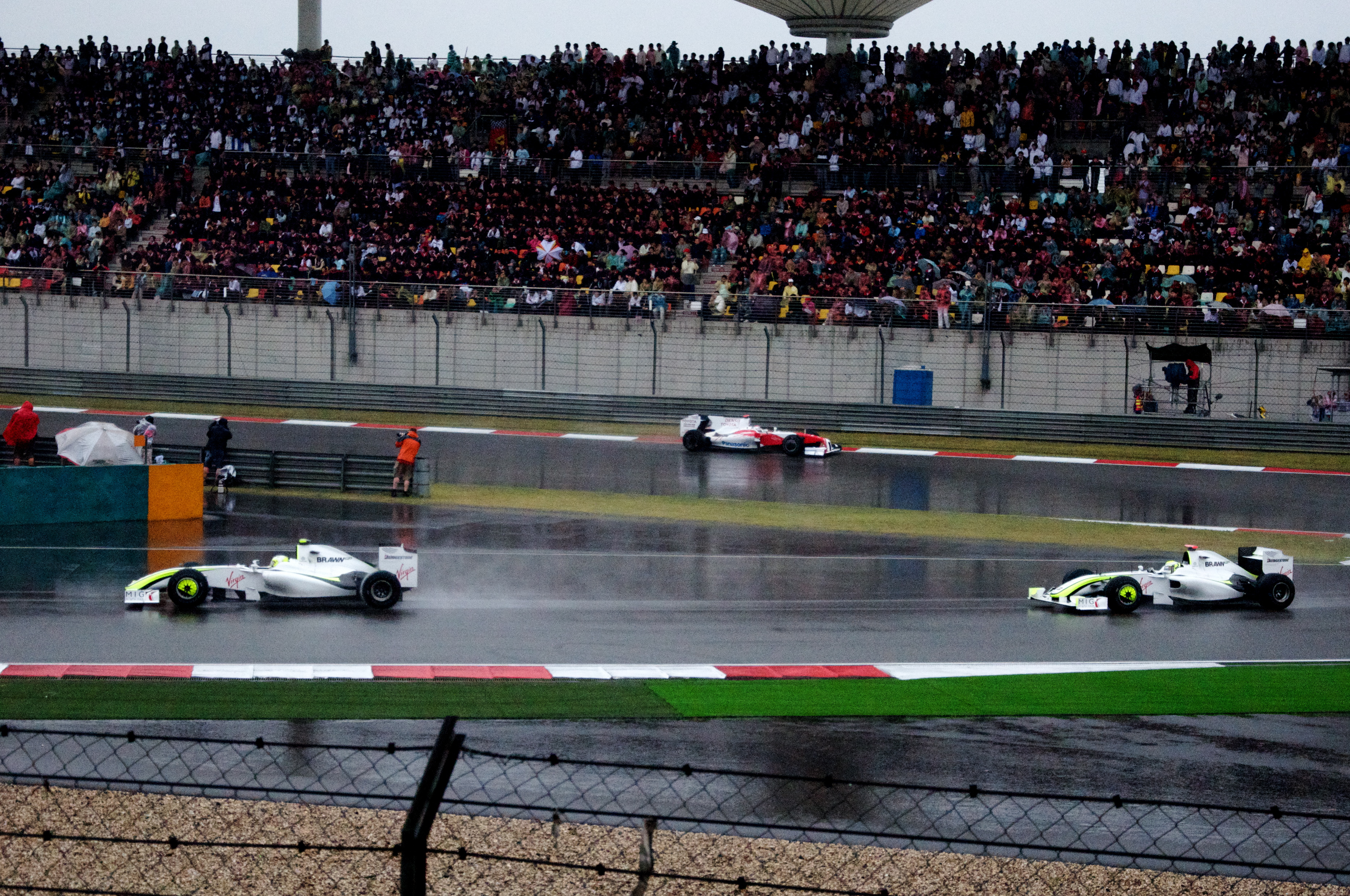 Button Barrichello an Trulli 2009 China